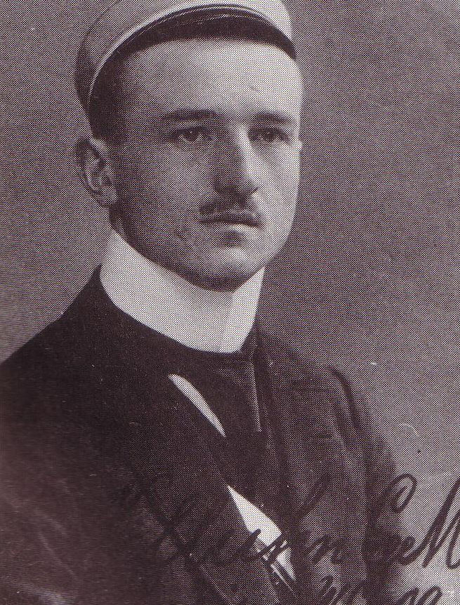 Fotografie von Franz Willuhn als aktivem Angehörigen des Corps Masovia Königsberg